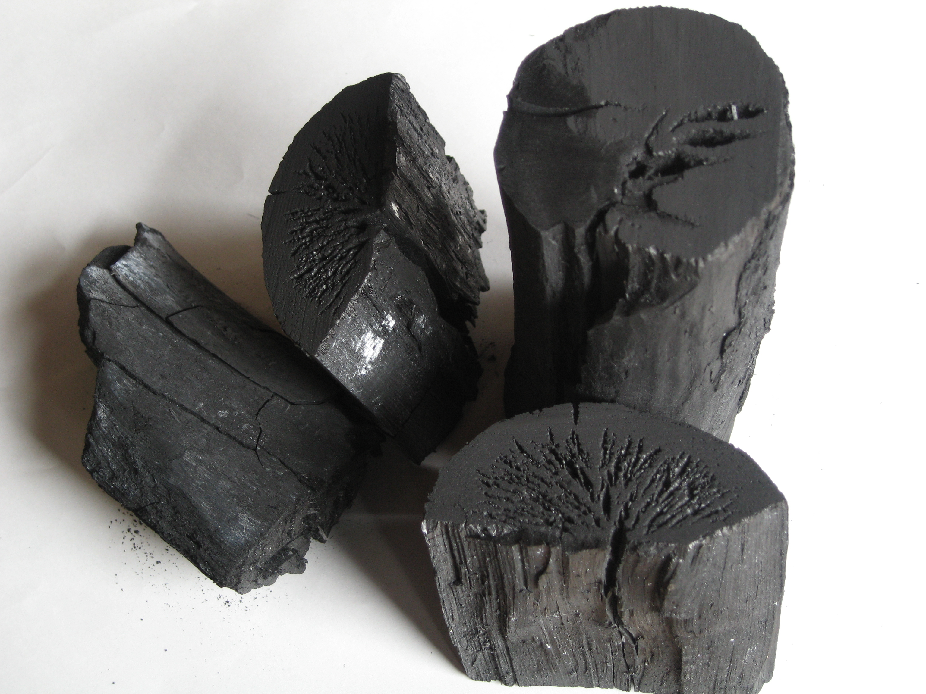 日本の楢などの黒炭